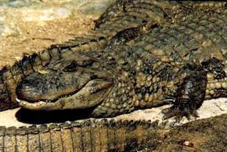 jacare